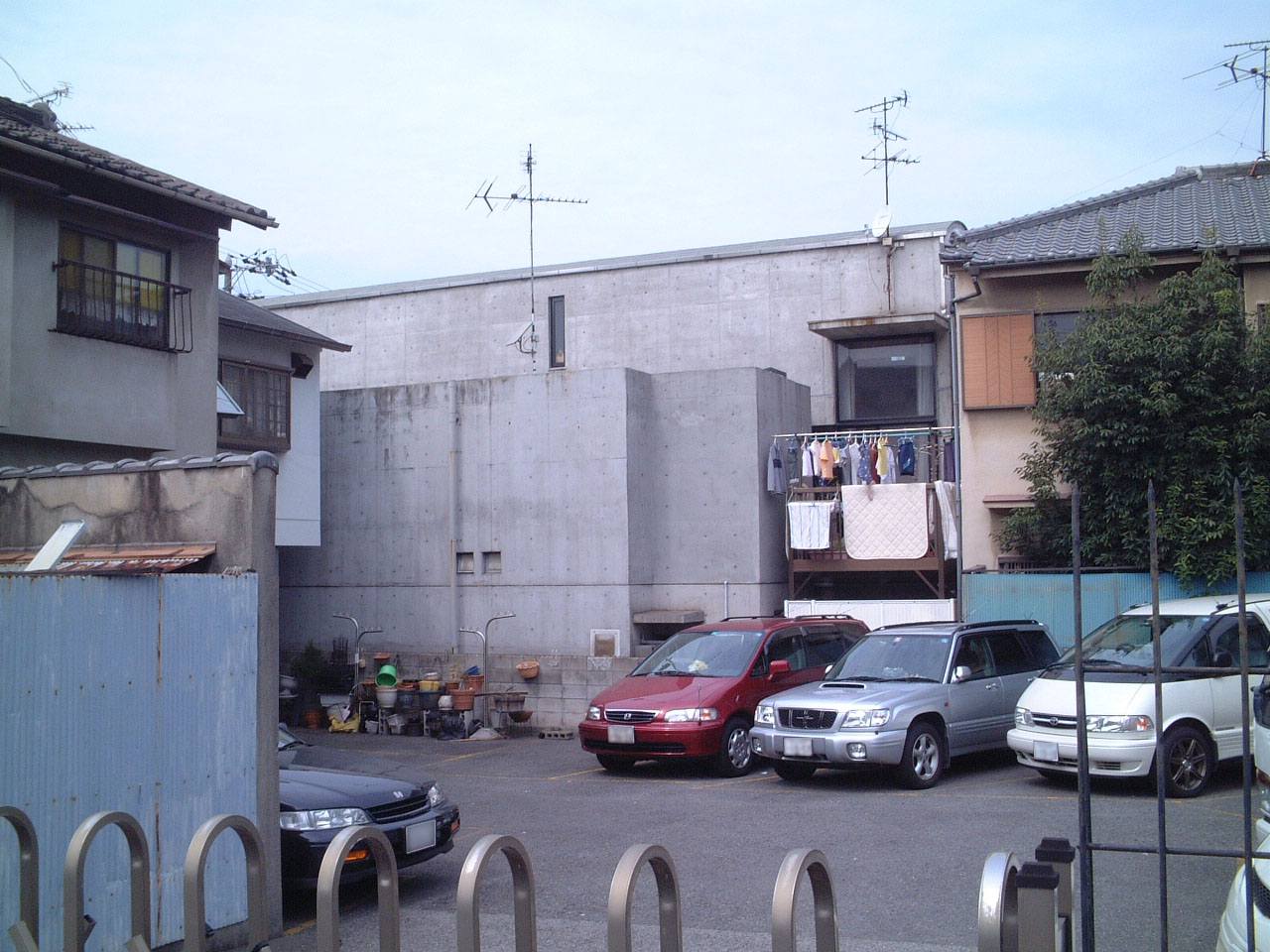 住吉の長屋 裏側からの風景写真